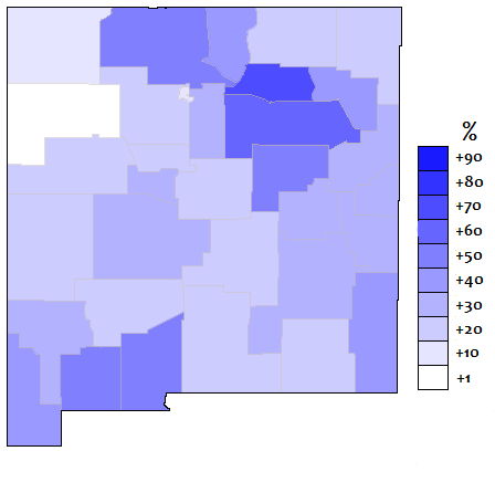 Nuevo México español por condados